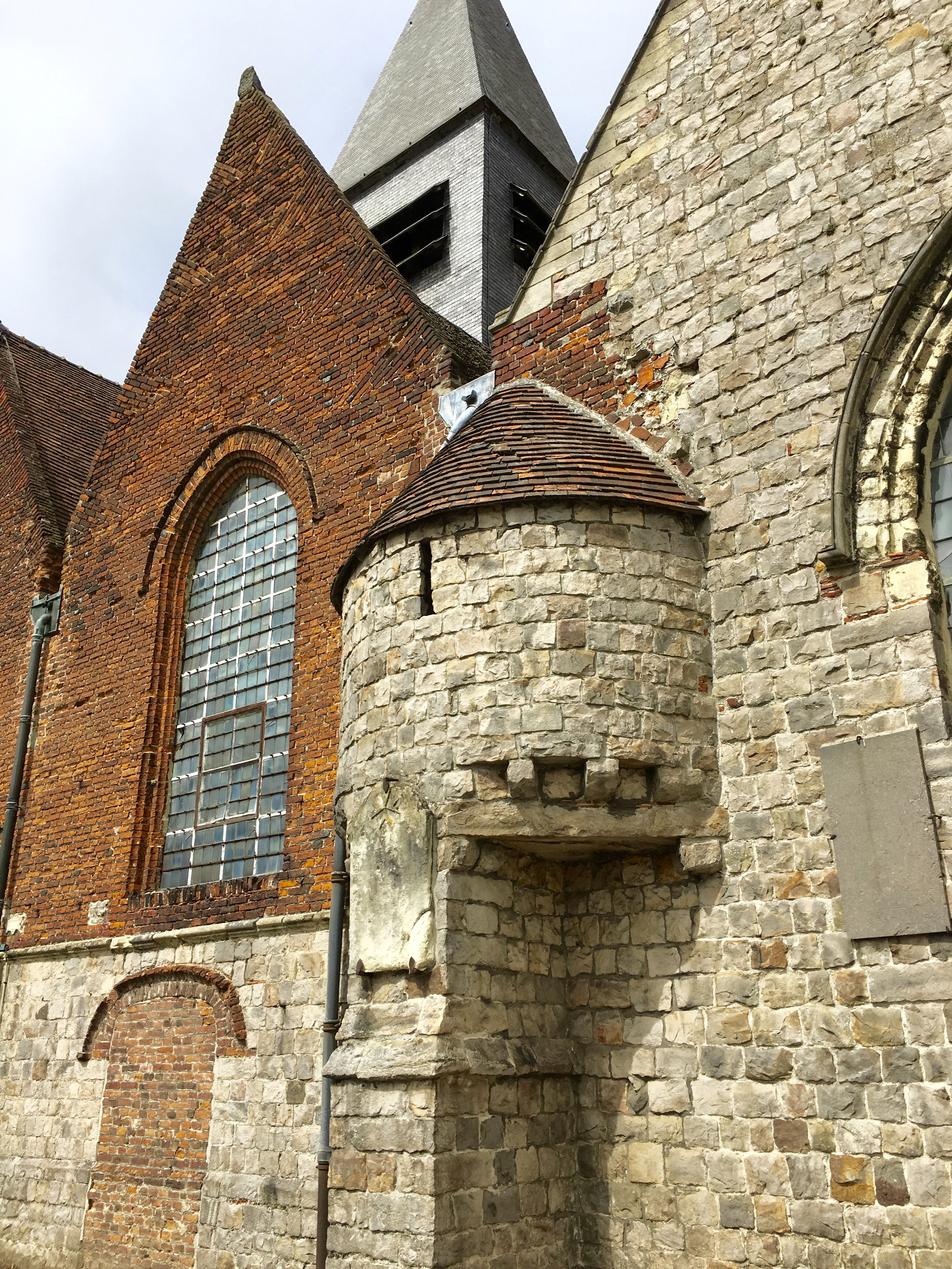 Échauguette de l'église Saint-Michel